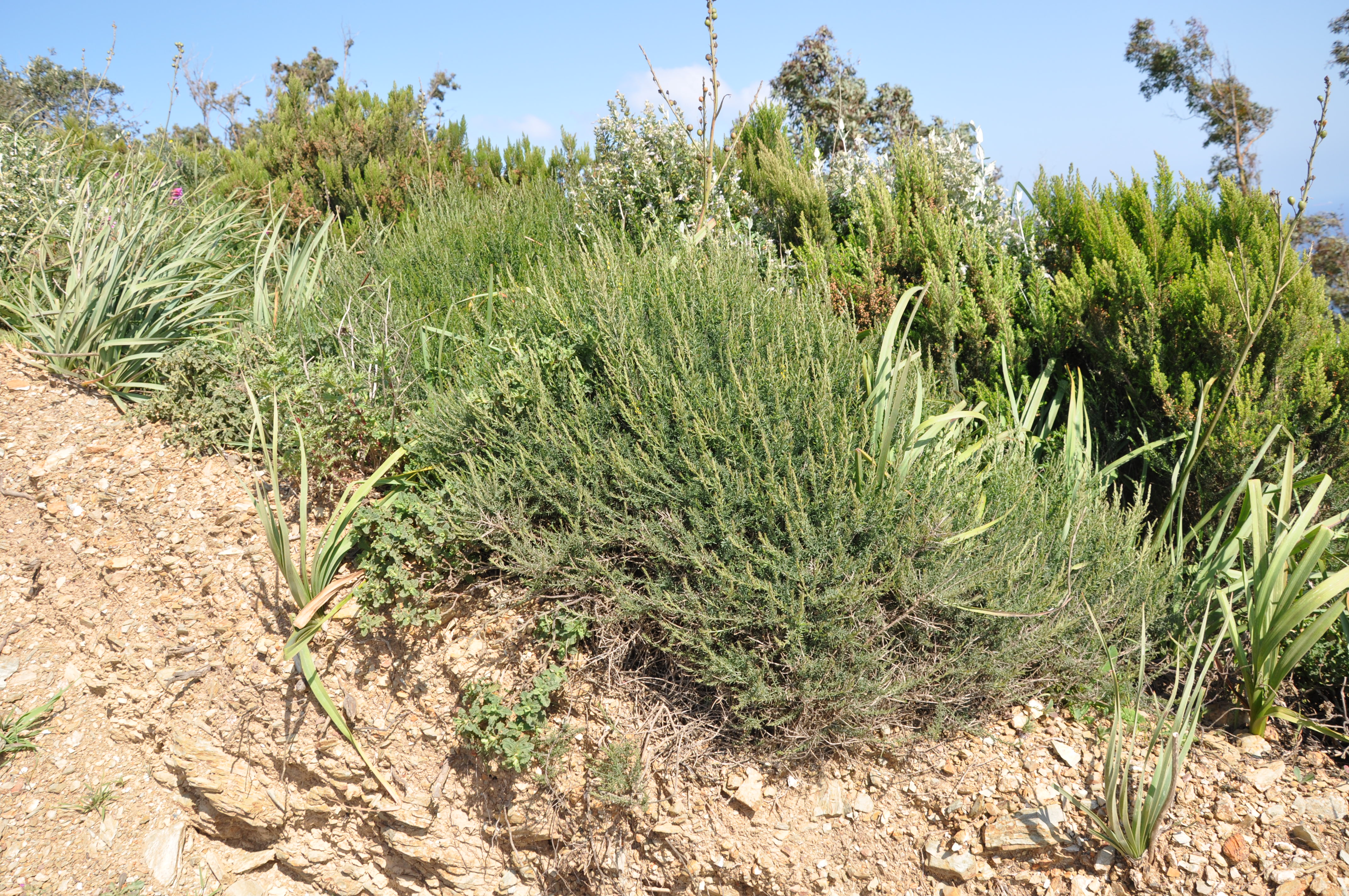 Hábito de la aulaga (Genista tridens), Ceuta, España.